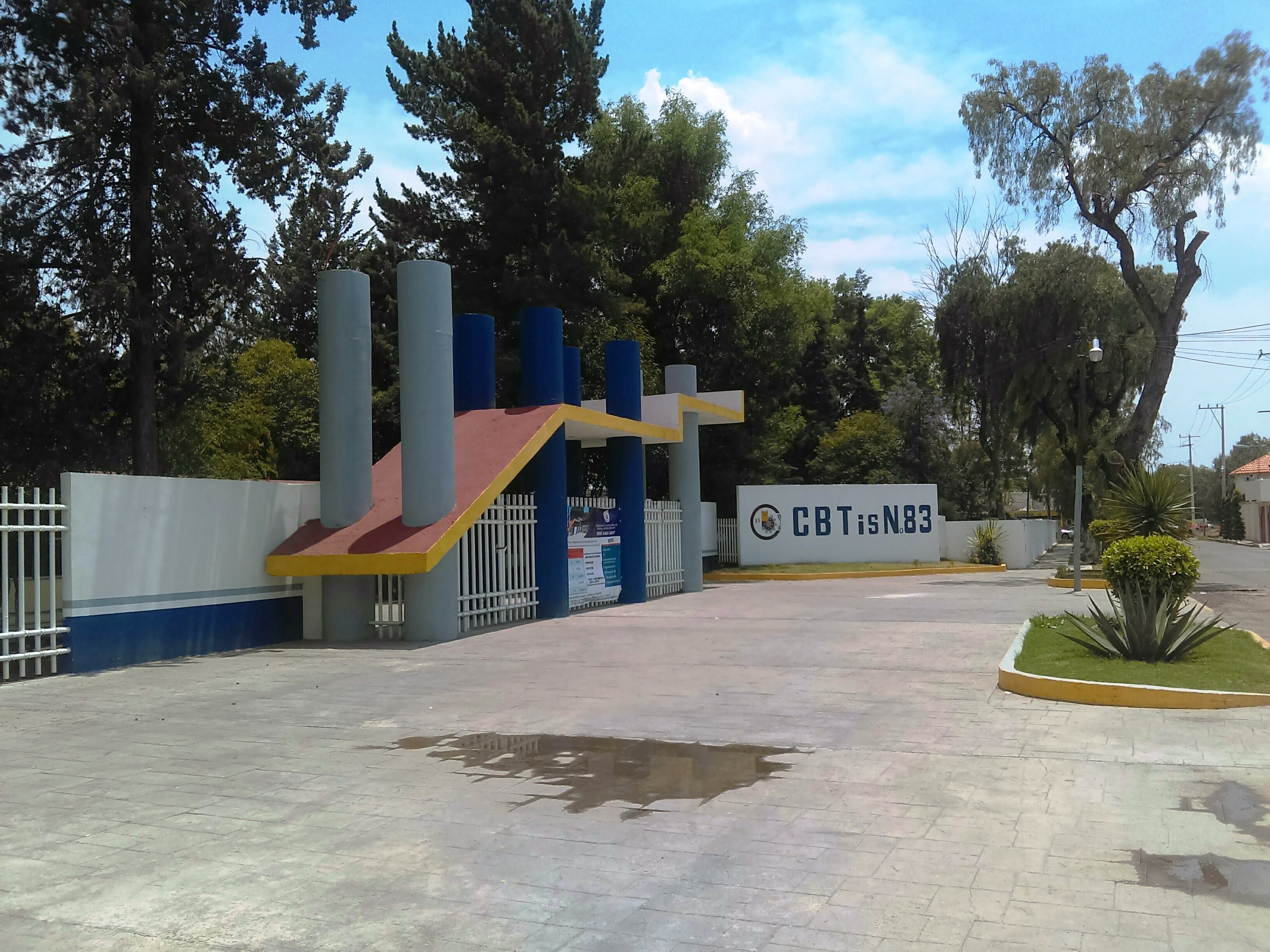 Escuela en Actopan, Hidalgo